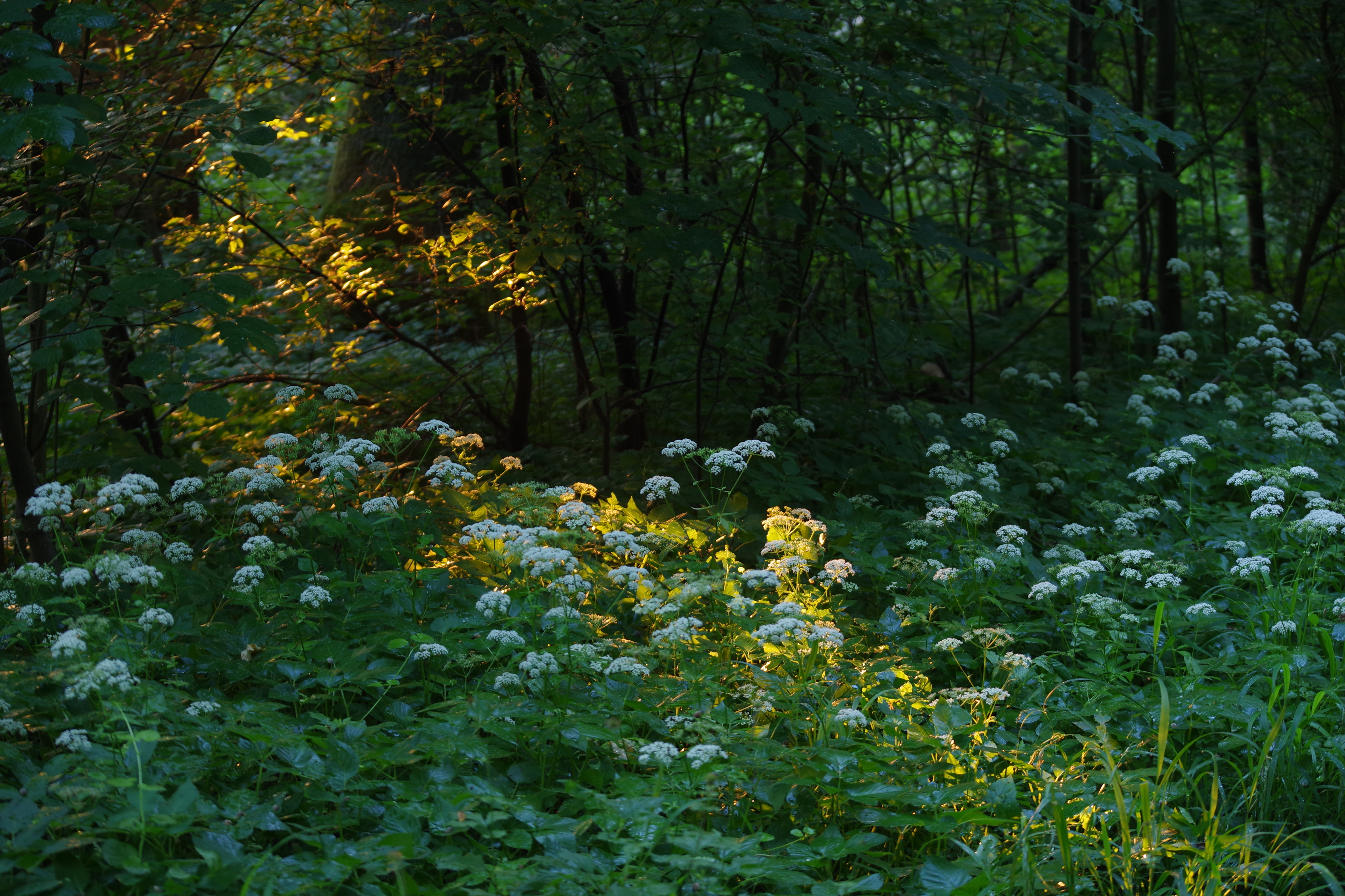 Zucheringer Wäldchen Sonnenstrahl